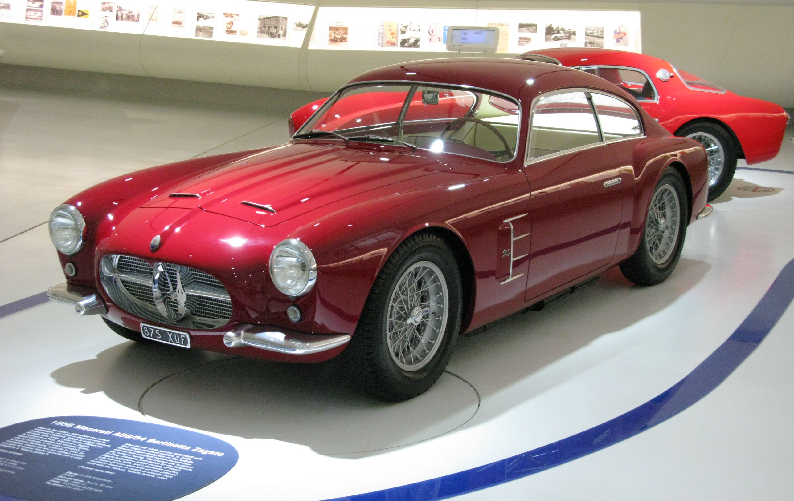 1956 Maserati A6G/54